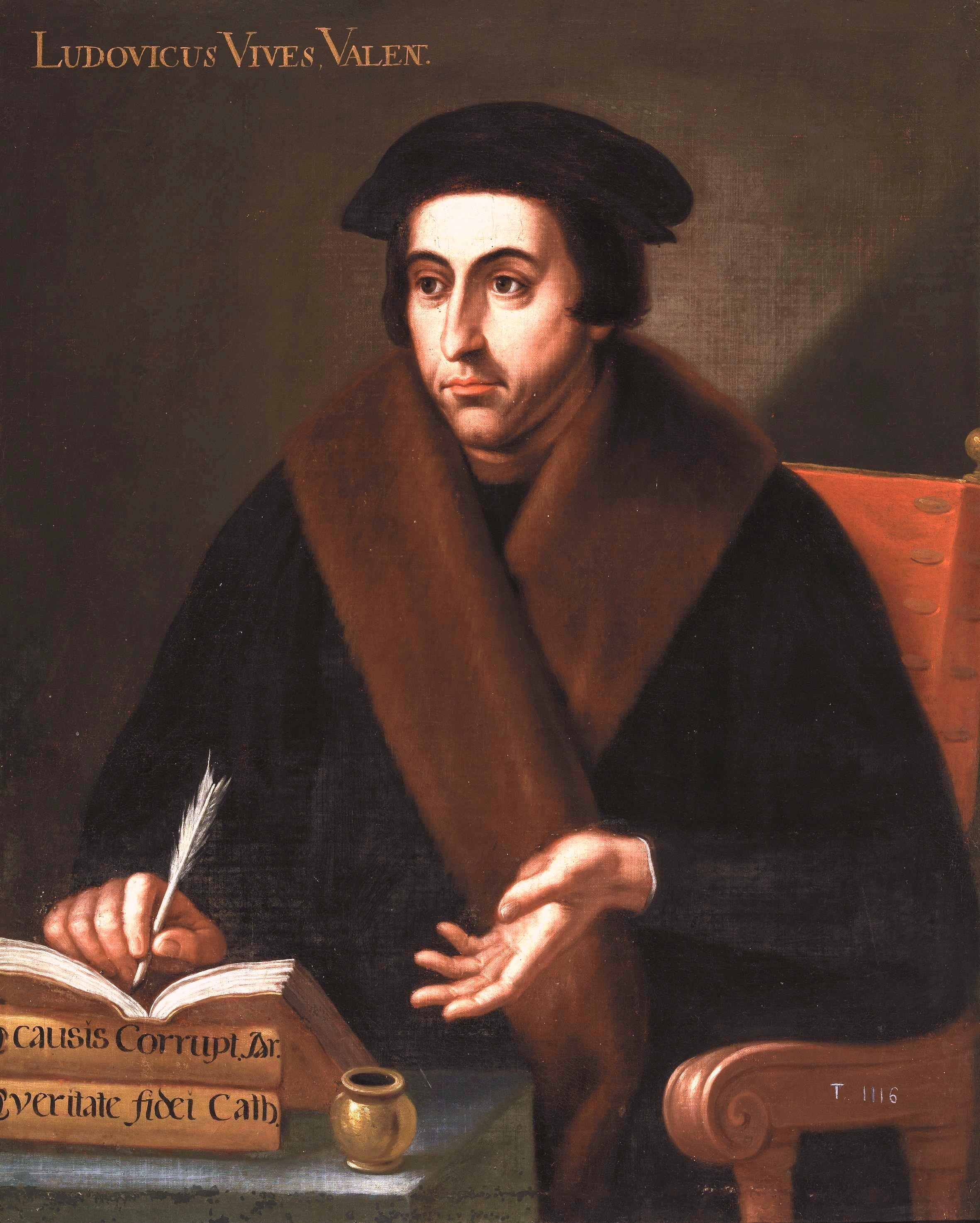 Retrato del insigne humanista español Juan Luis Vives (1492-1540).